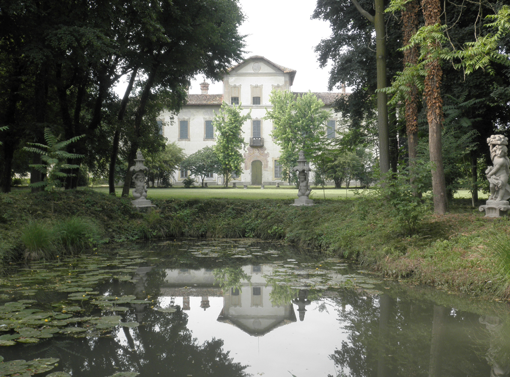 Villa Barni a Roncadello, fraz. di Dovera